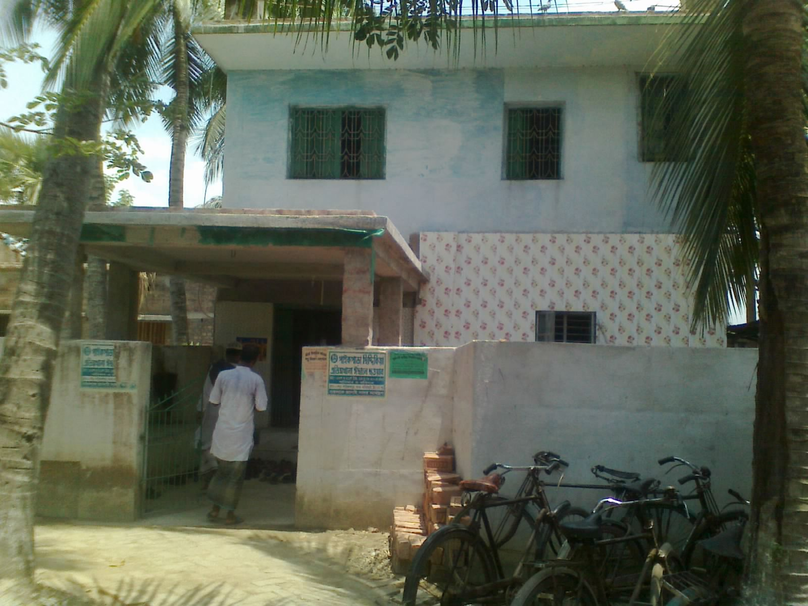 Jhuruli Mosque (Maszid)